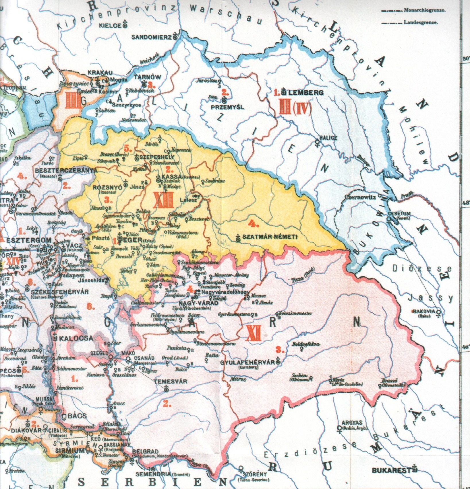 Karte der römisch-katholischen Bistümer im Osten Österreich-Ungarns. Aus: Cölestin Wolfsgruber, Kirchengeschichte Österreich-Ungarns, Wien 1909.